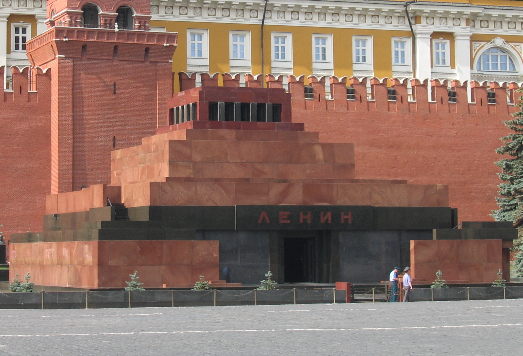 Mauzoleum Lenina